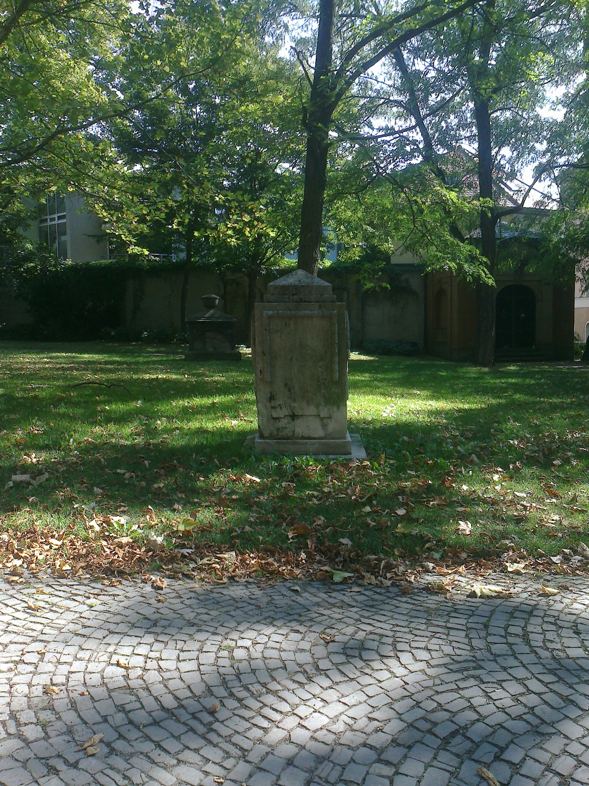 Gedenkstein auf Johann Martin Mieding